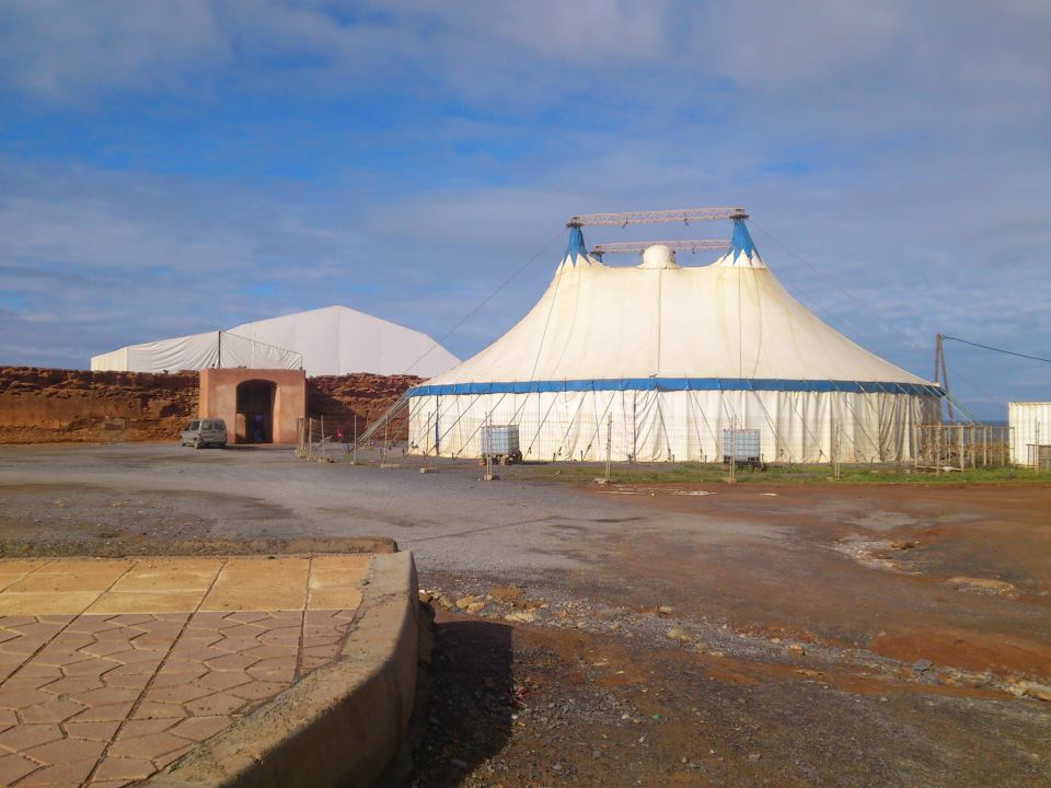 crique Shems'y Salé